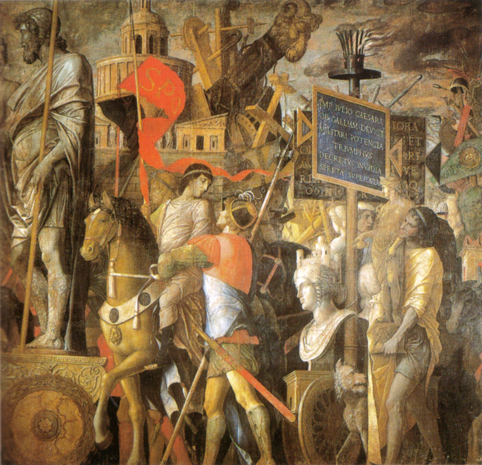 detail